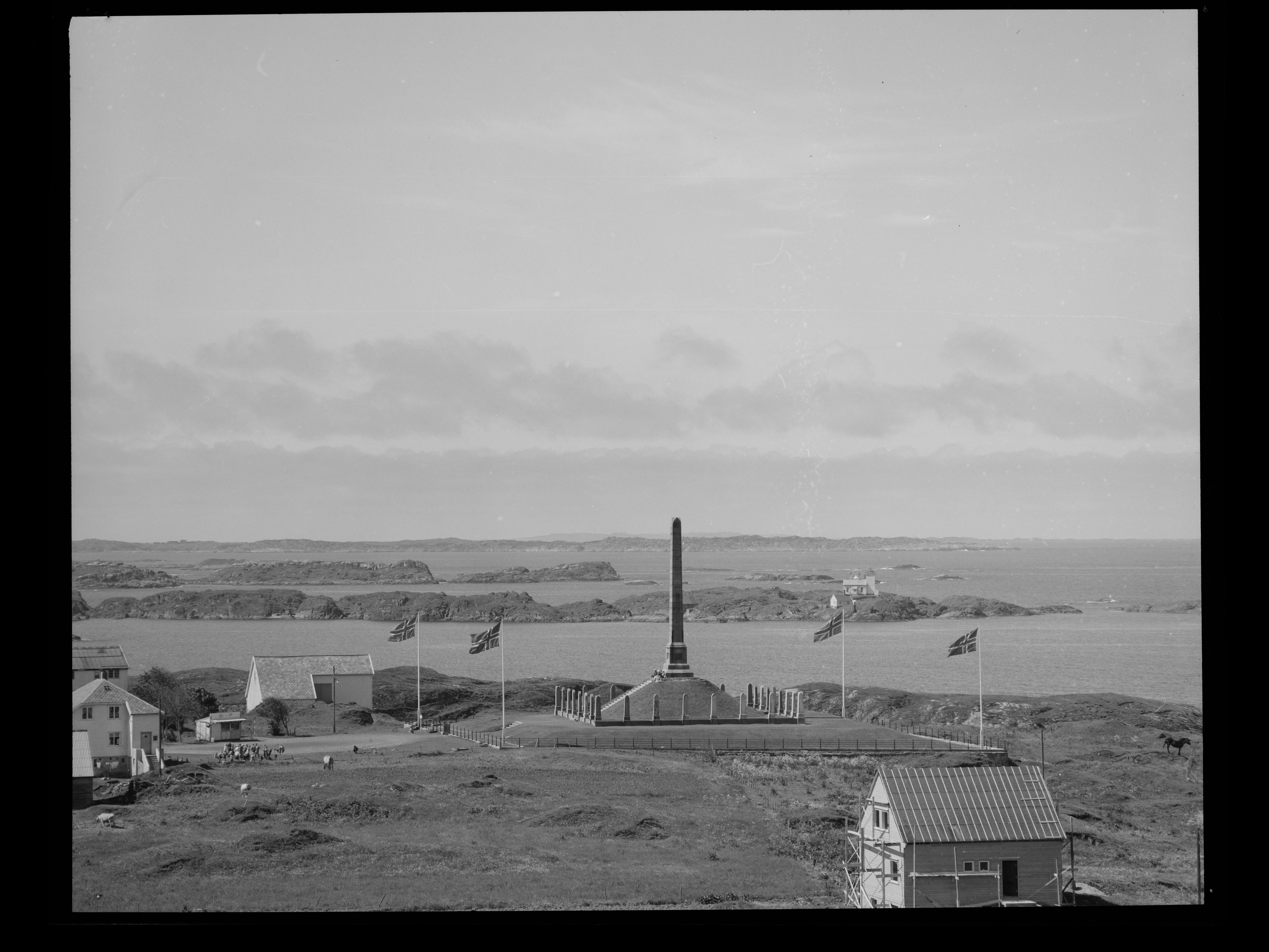 Bildet er hentet fra Nasjonalbibliotekets bildesamling. Anmerkninger til bildet var: Fotograf: ÅM Gard,Haugesund, Haugesund, Rogaland